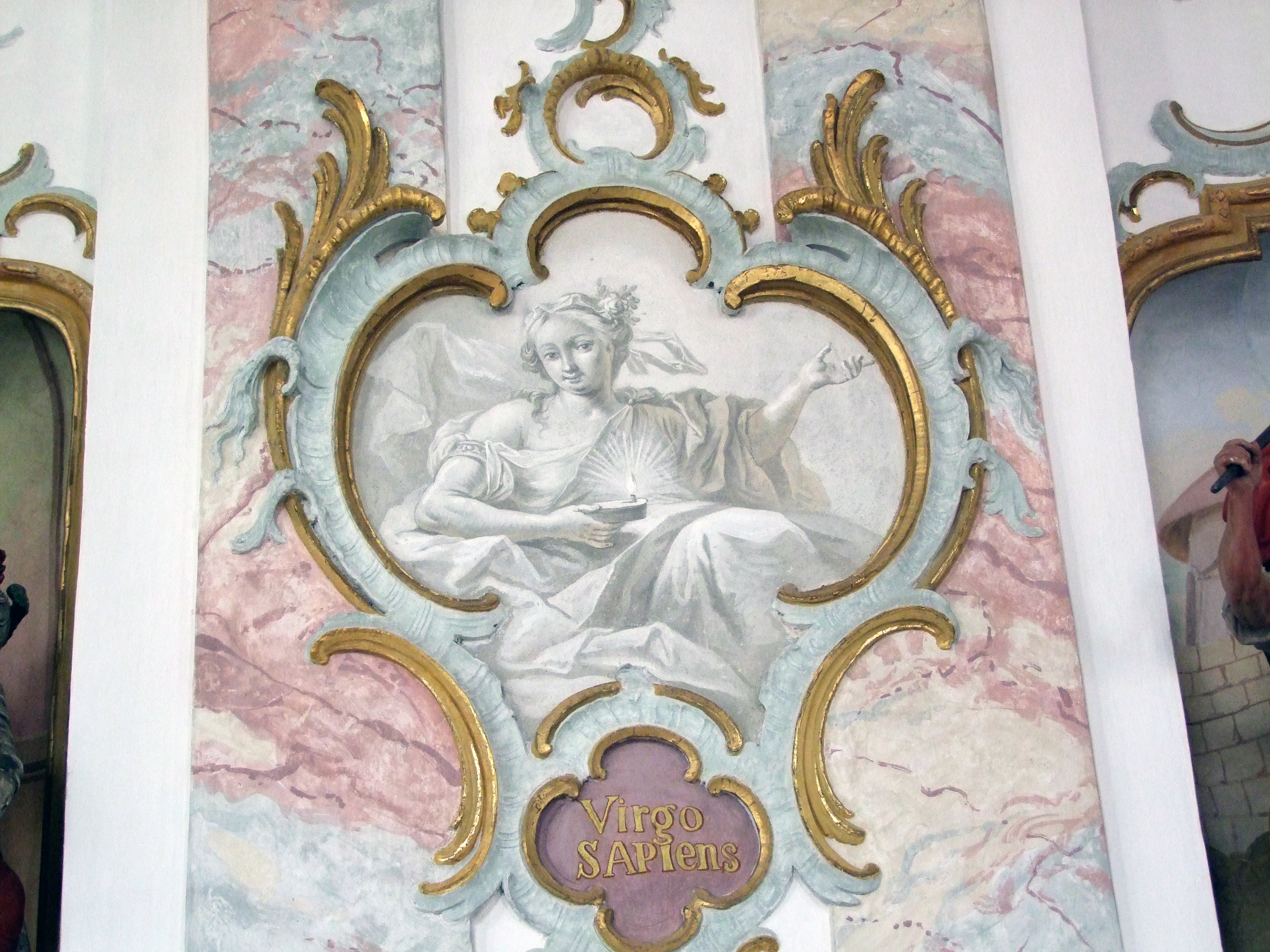 Wallfahrtskirche "Unserer lieben Frau vom Berge Karmel" im oberschwäbischen Mussenhausen, Gemeindeteil Markt Rettenbachs bei Memmingen. Fresko vom Gleichnis der klugen und törichten Jungfrauen im Langhaus. Hier die Kluge Jungfrau Cirgo Sapiens